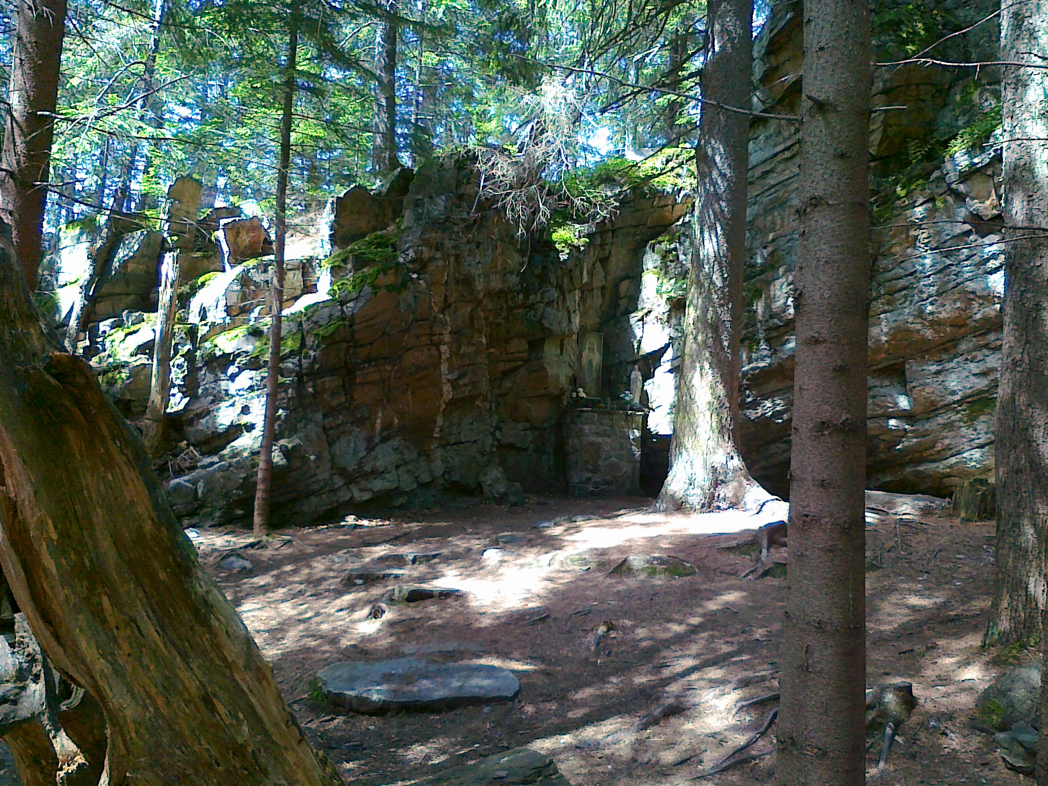 Widok na Grotę Lurdzką na stoku Zámecký pahorek